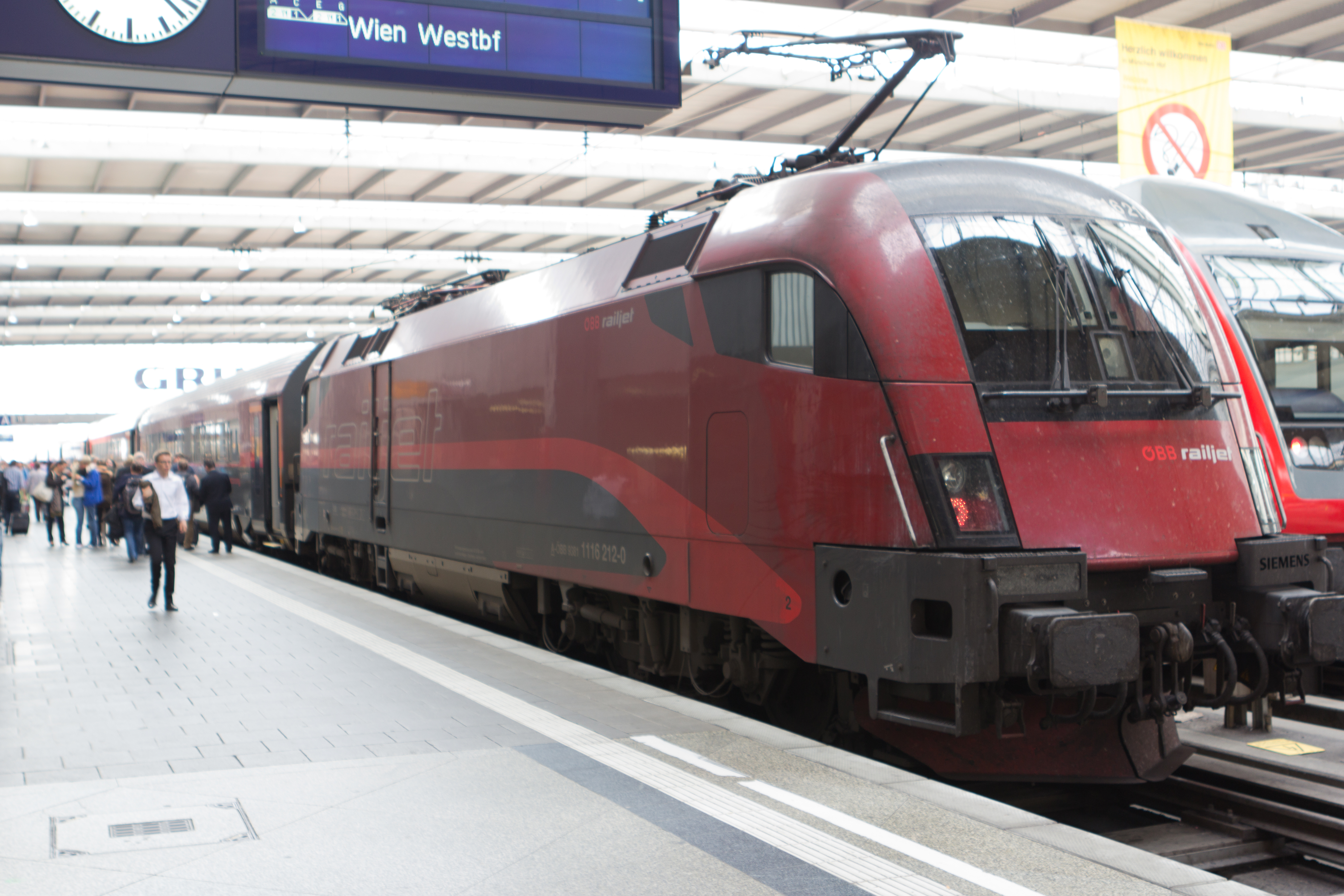 Trains dans la gare centrale de Munich (Munich - Allemagne)